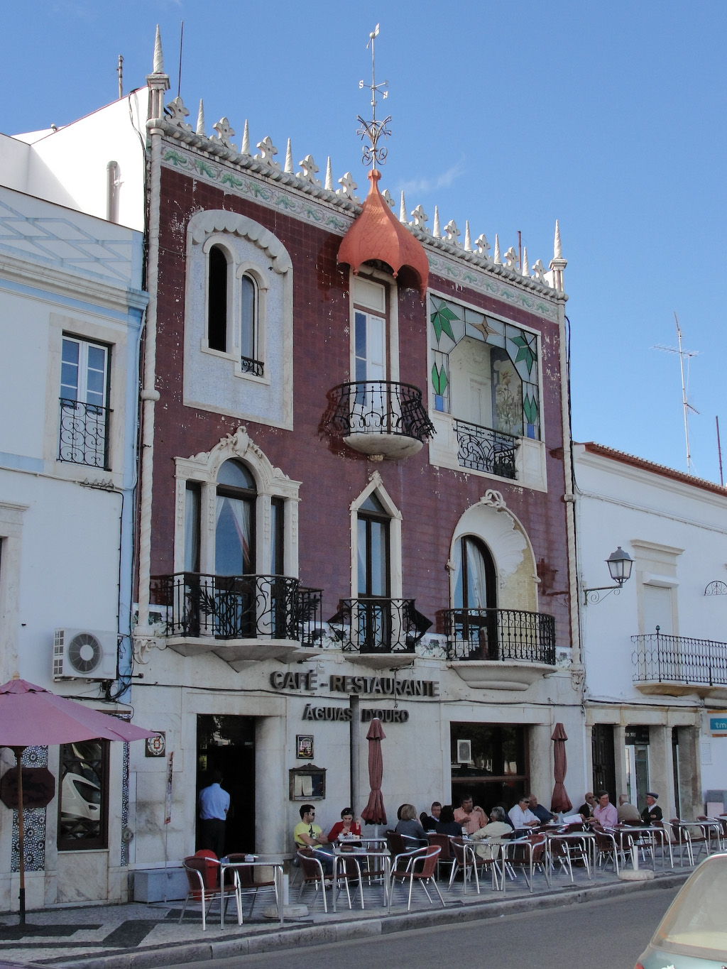 Café Águia d'Ouro in Estremoz